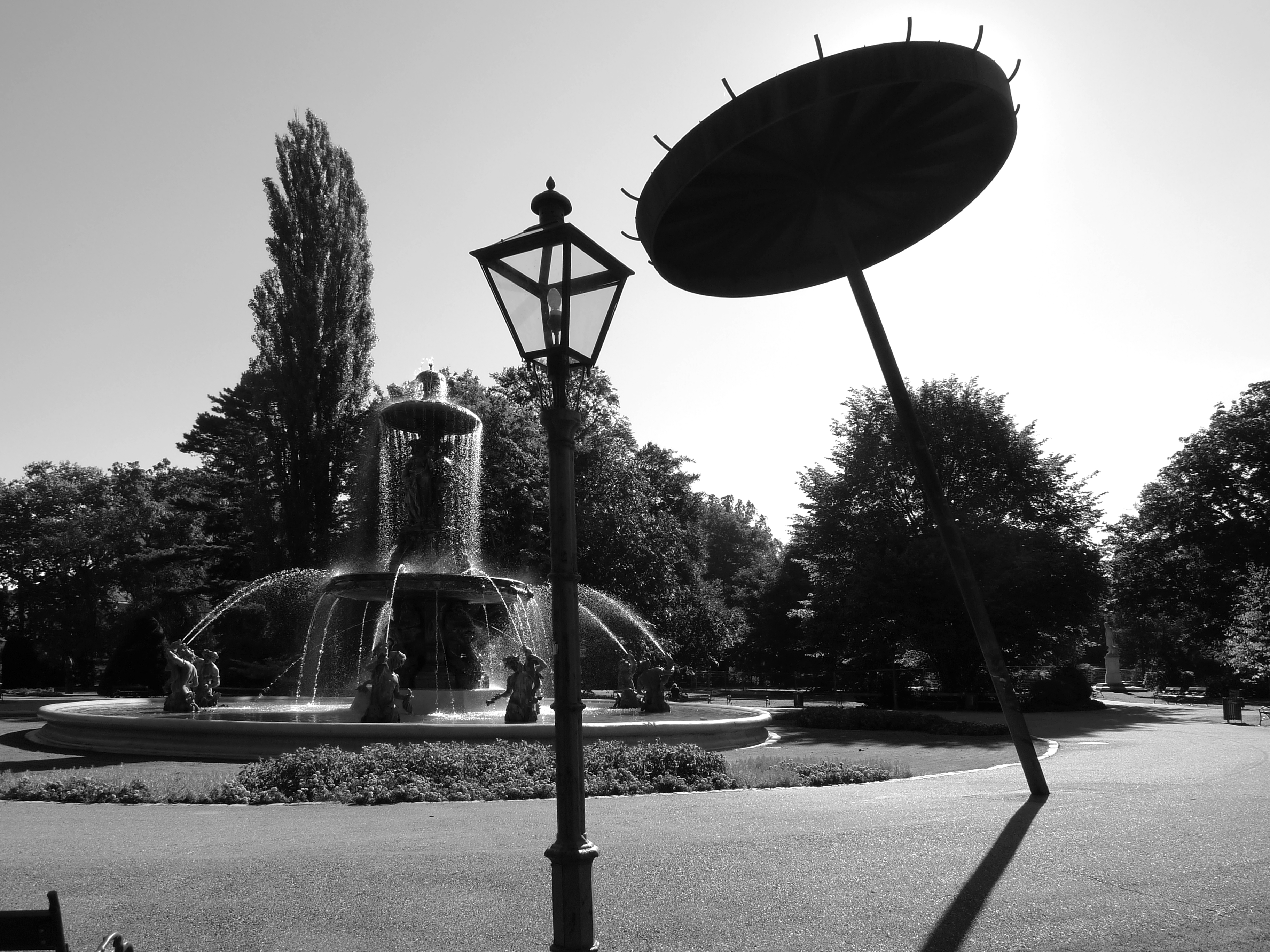 ‚Brunnenwerk‘ von Serge Spitzer im Stadtpark in Graz